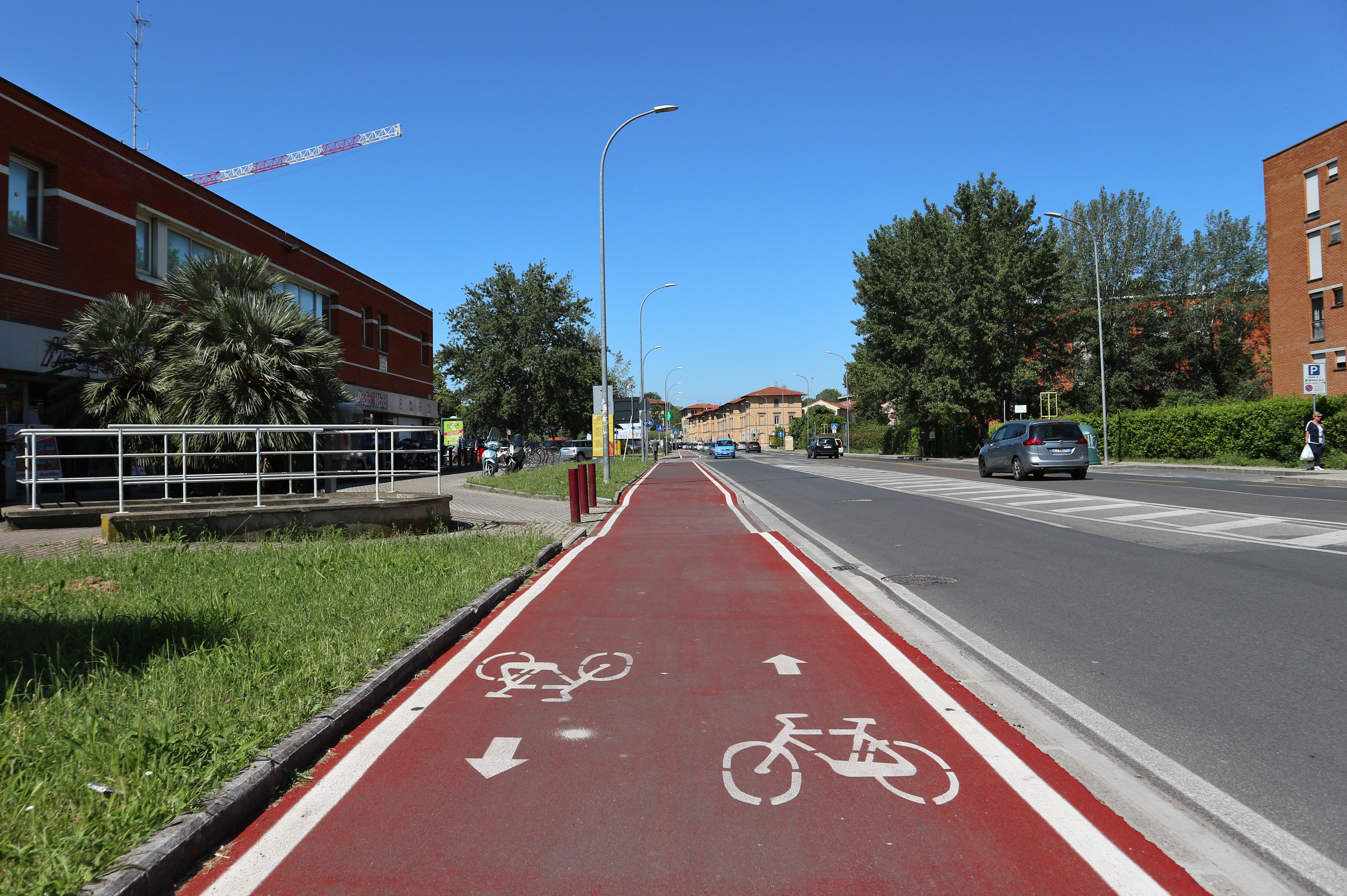 Pista ciclabile nel quartiere di Cisanello a Pisa